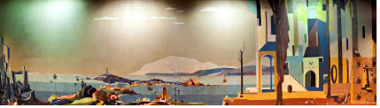 Mural obra de Urbano Lugrís González, na rúa Real da Coruña, no Caffé Vecchio.